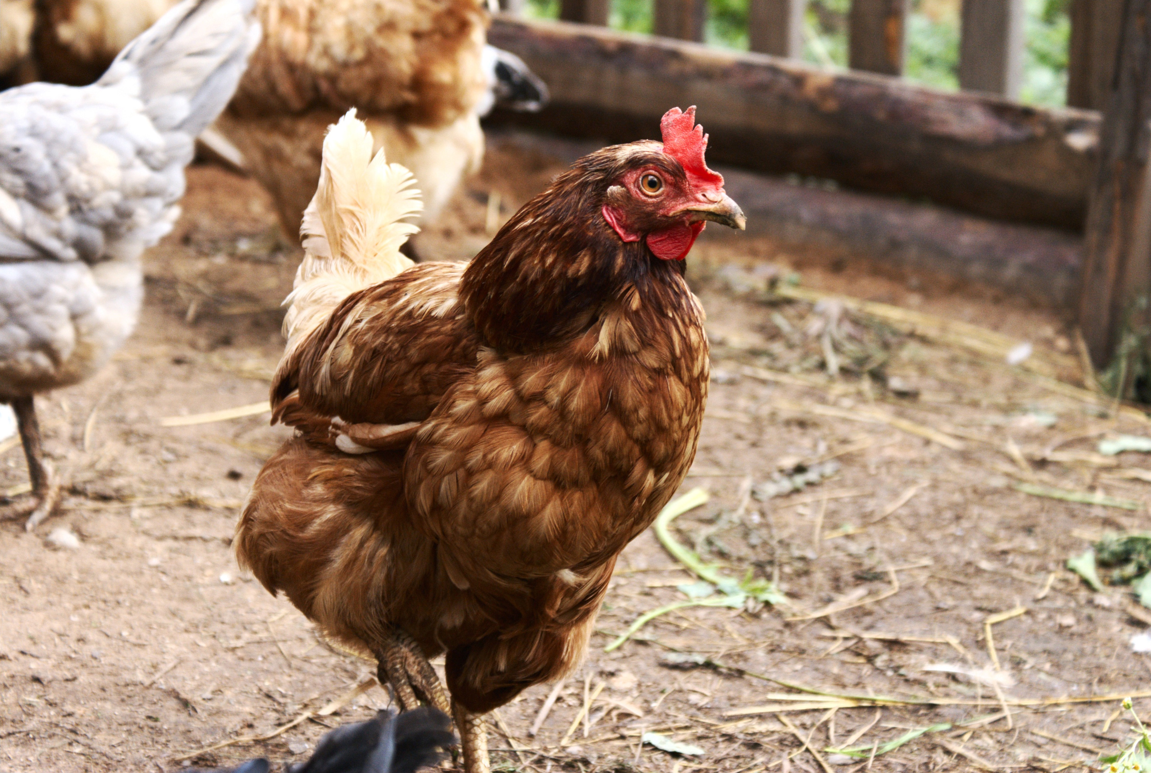 Взрослая курица породы Ломанн Браун в загоне для домашней птицы (двор курятника).